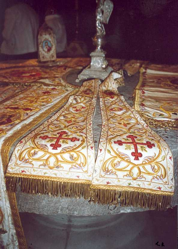 étole brodée, église Saint Mansuy Fontenoy-le-Château